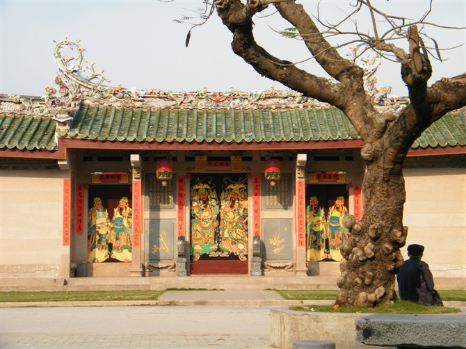 青篮蔡氏家庙